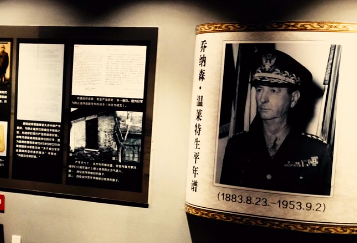 中文（中国大陆）: 辽源二战盟军战俘营旧址室内